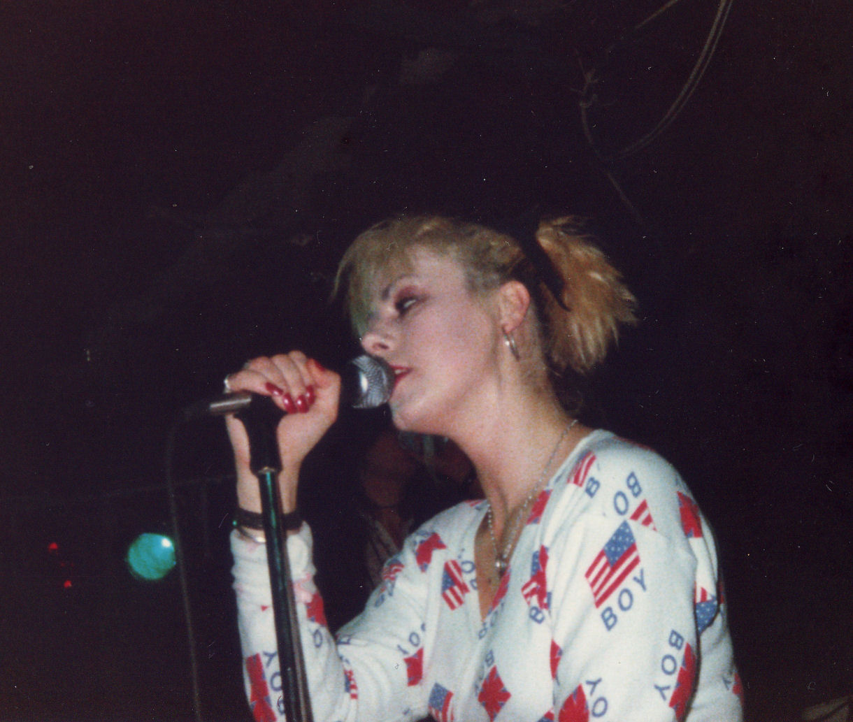 Anne-Marie Hurst, Ghost Dance, 23 December, 1988